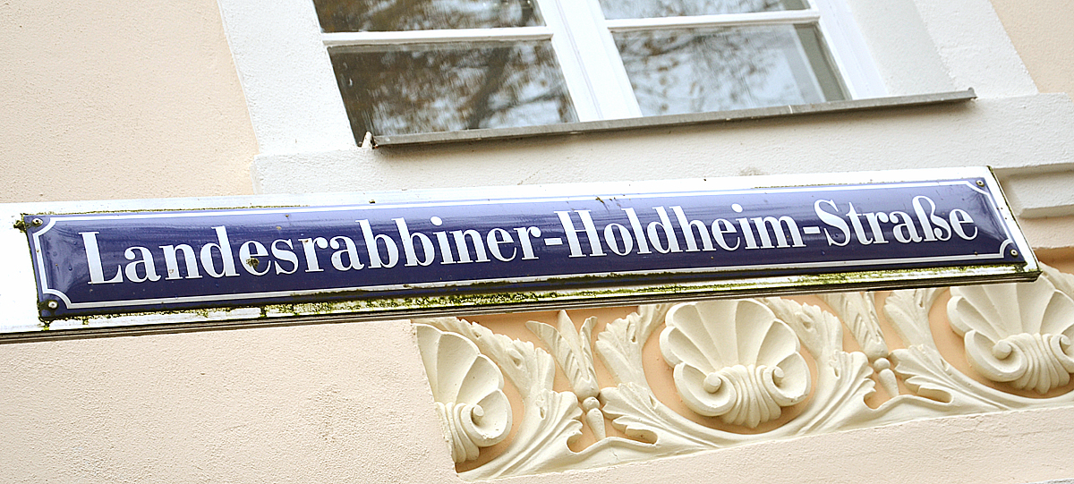 Das Straßenschild Landesrabbiner-Holdheim-Straße in der Altstadt der Mecklenburg-Vorpommerschen Landeshauptstadt Schwerin, hier aufgenommen am 2. November 2015 nach dem von verschiedenen Wikipedianern veranstalteten Arbeitstreffen Wikipedia:WikiDACH 2015 im Schweriner Schloss, erinnert an den jüdischen Gelehrten und Rabbiners des Reformjudentums, Samuel Holdheim ...